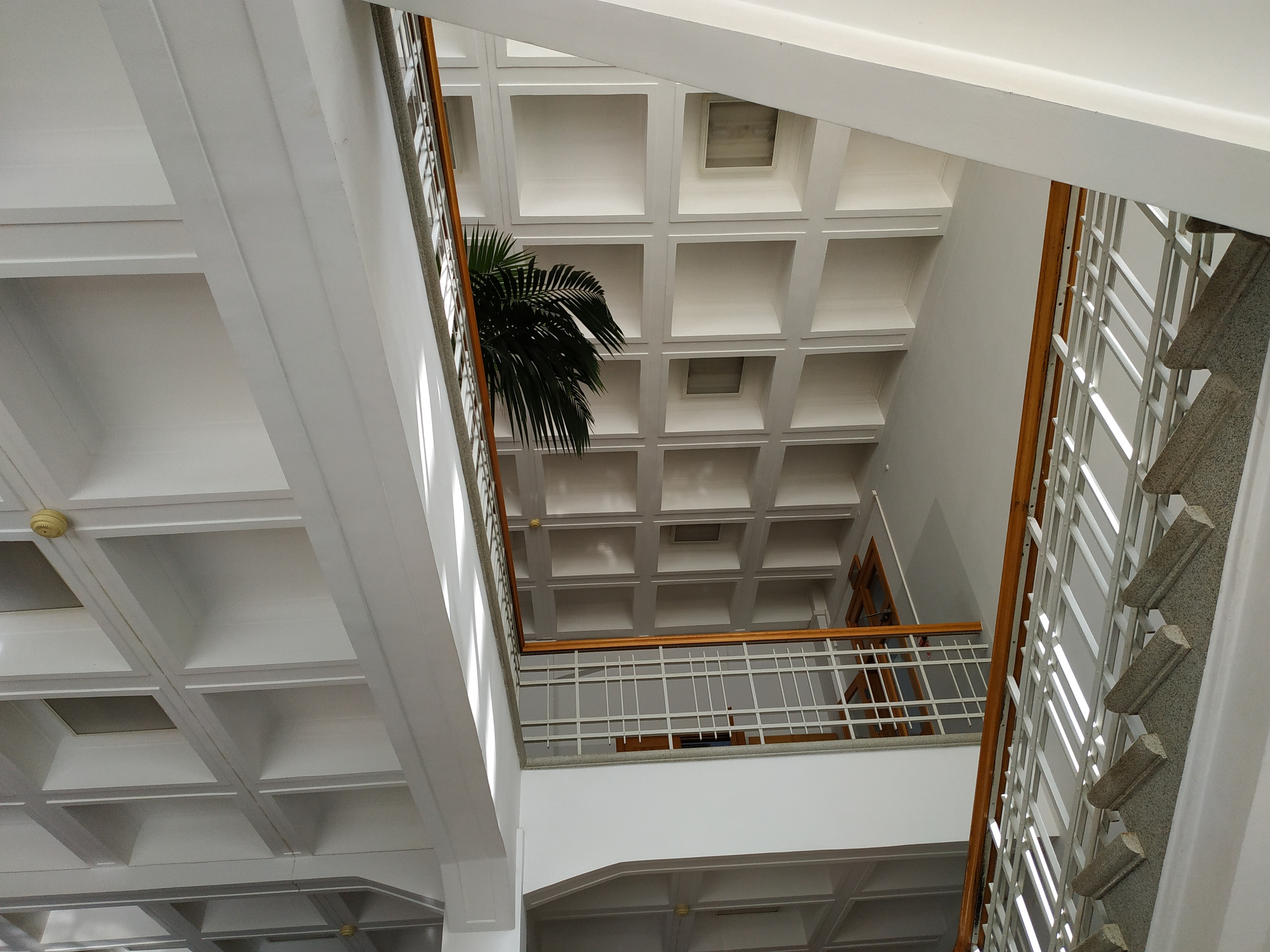 Беларуская (тарашкевіца): Інтэр'ер будынку факультэта геаграфіі і геаінфарматыкі БДУ